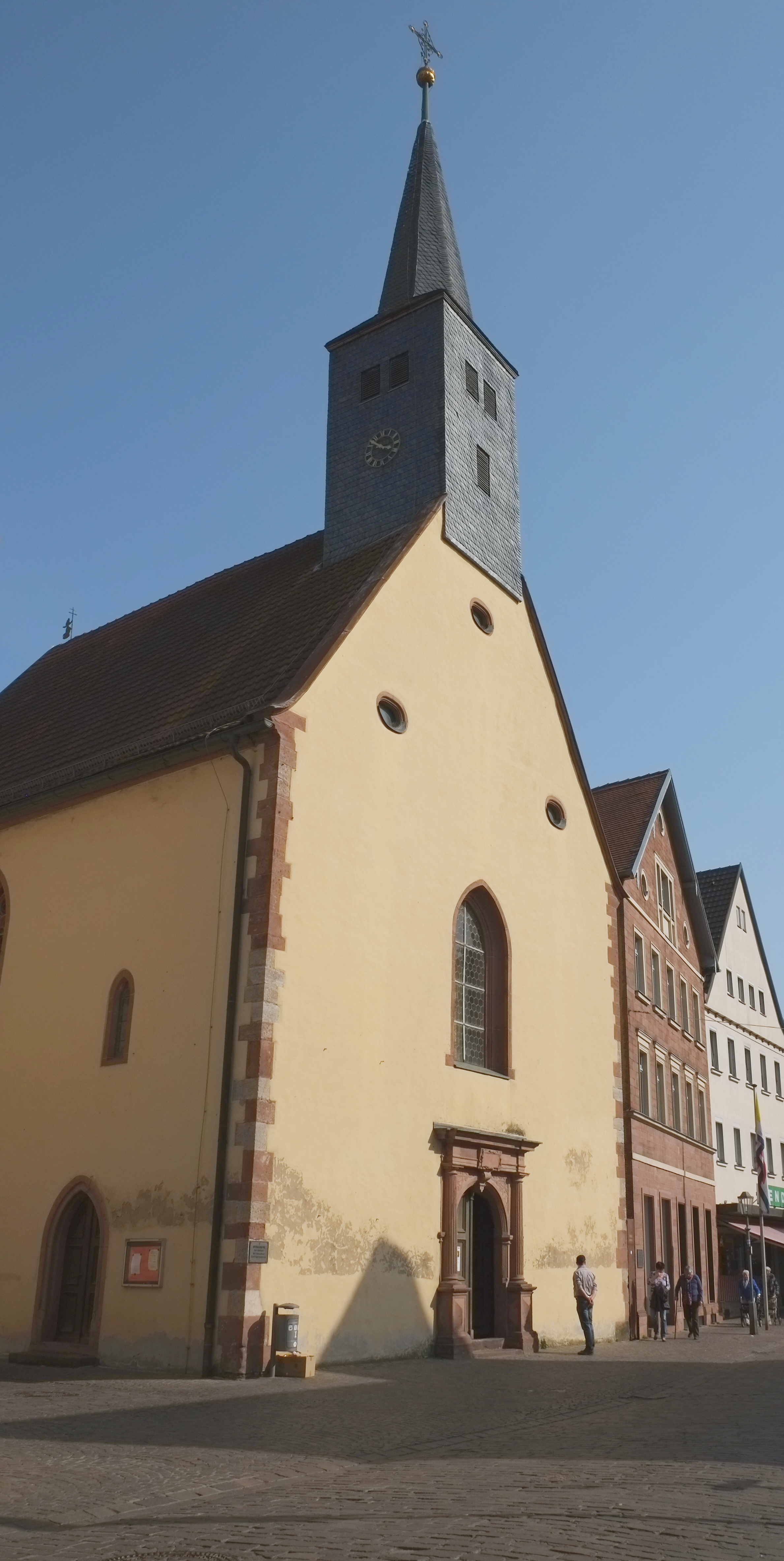 Spitalkirche in Karlstadt im Main-Spessart-Kreis (Bayern, Deutschland)